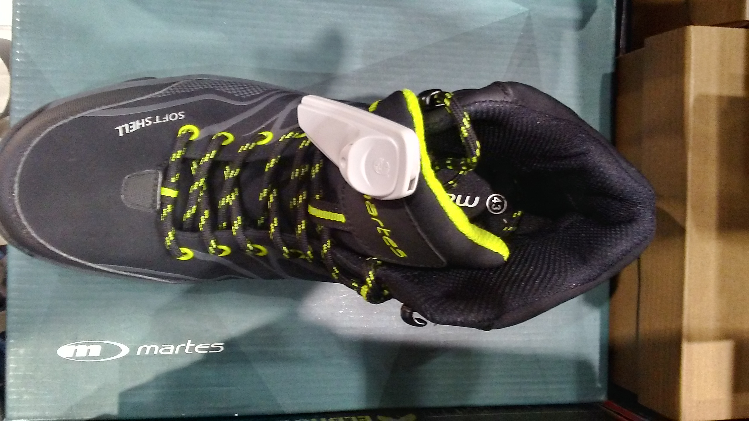 Logotyp Matres Sport na opakowaniu od obuwia. CC0